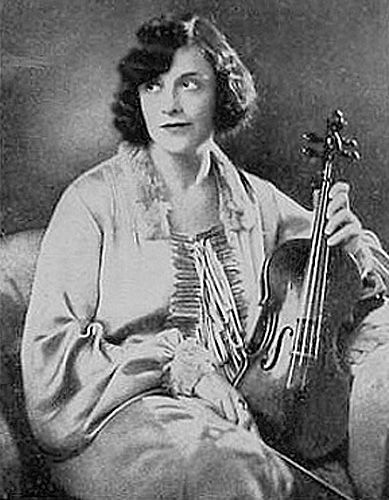 Die Geigerin und Orchesterleiterin Edith Lorand